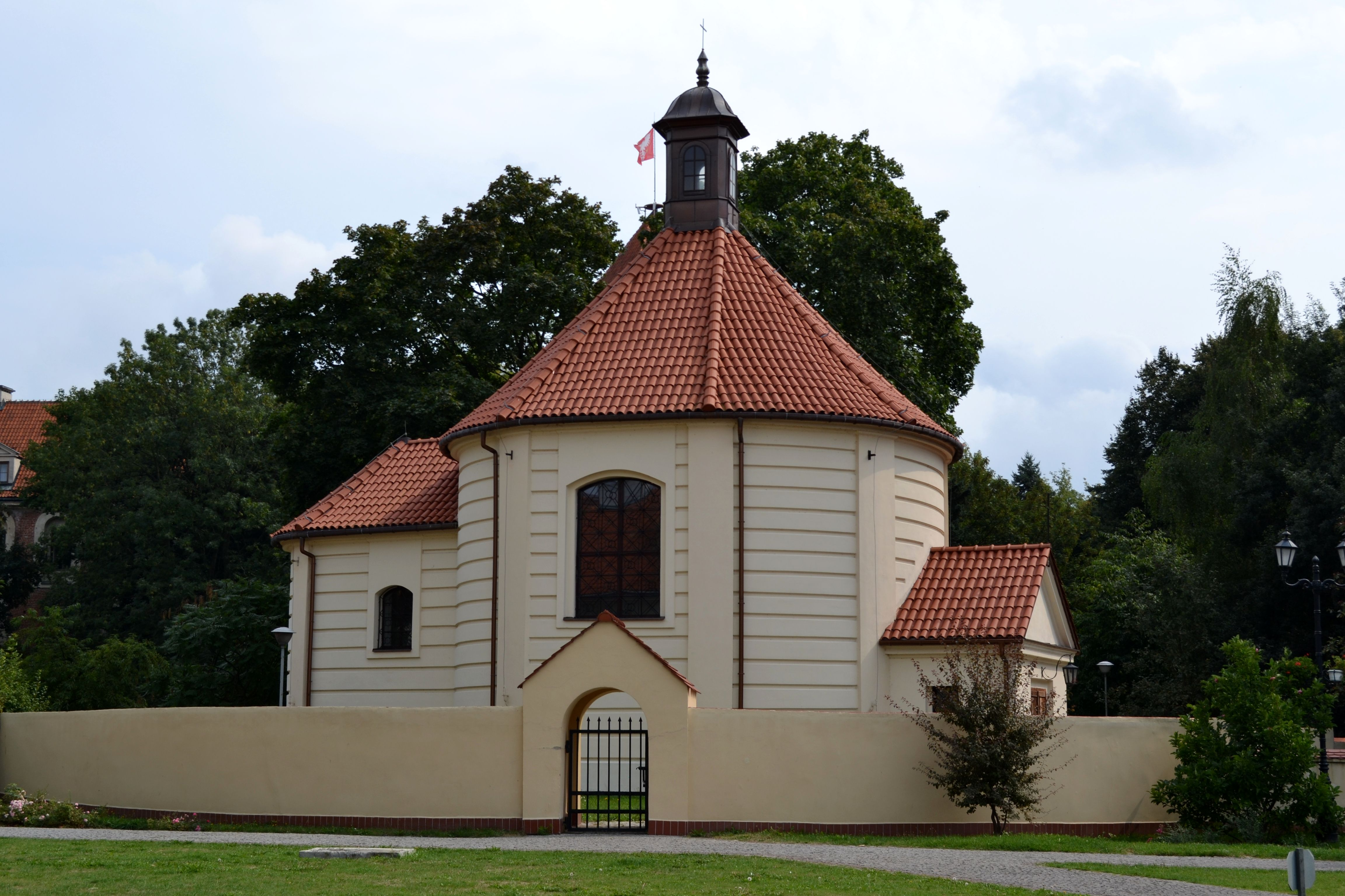 Pułtusk, kaplica, ob. kościół pw. św. Marii Magdaleny, pocz. XVI, 1626, 1737-1739, 1946-1951